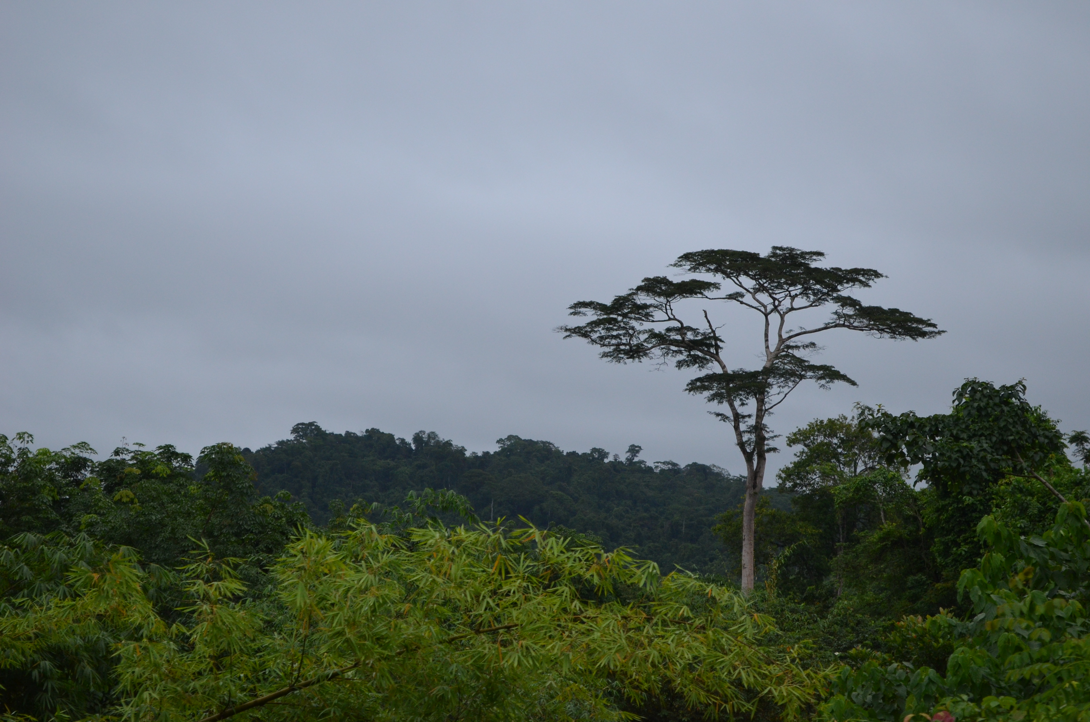 Liberia, Africa 2012